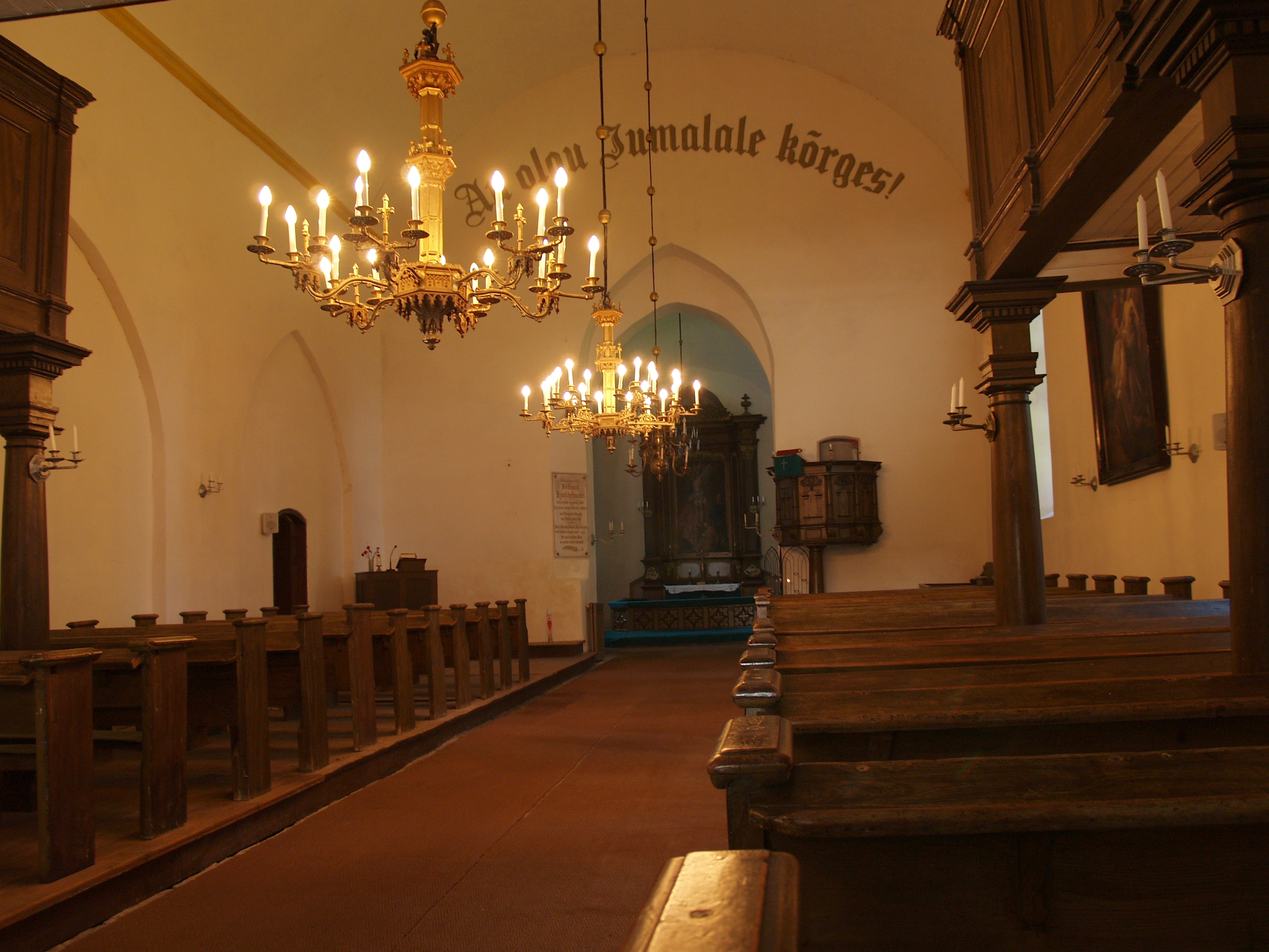 Kose kirik